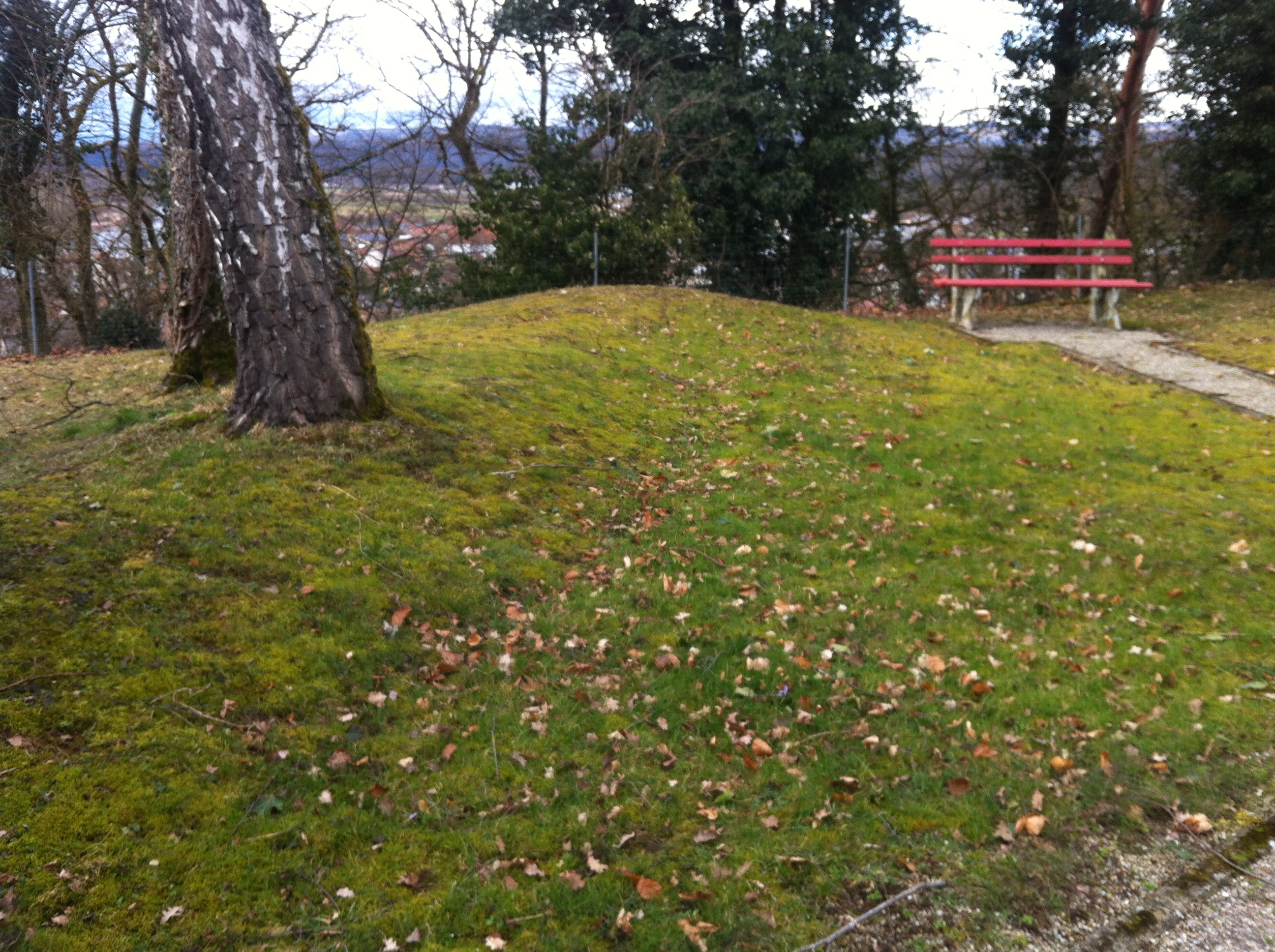 Der letzte Rest eines frühgeschichtlichen Walls in Kadelburg, Gemeinde Küssaberg in Baden-Württemberg auf der Anhöhe der evangelischen Bergkirche.